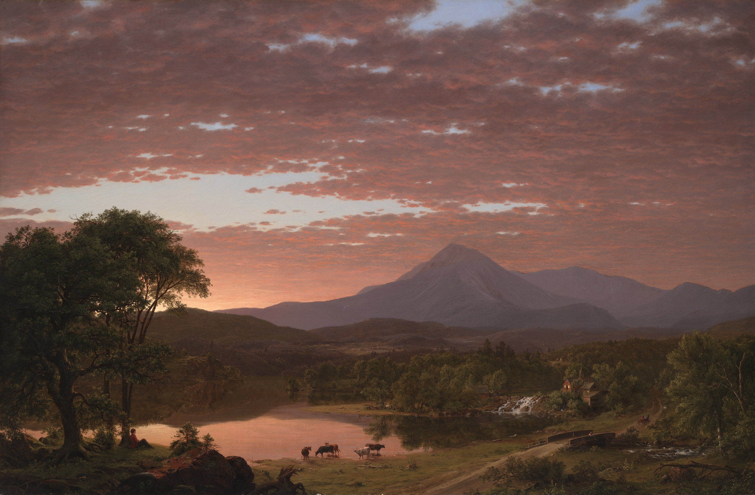 Mt. Katahdin